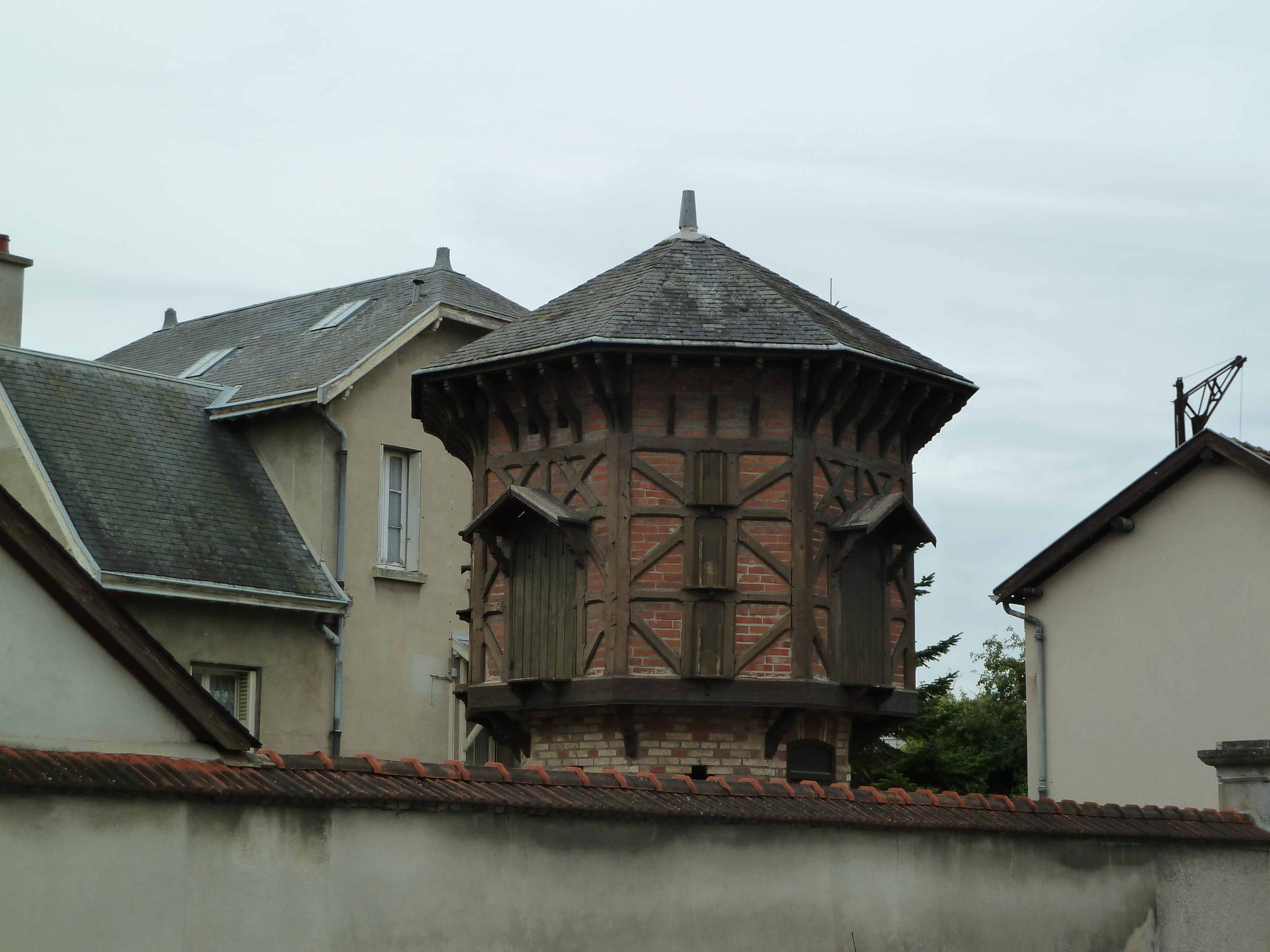 Pigeonnier Chateau de Courcelles St Brice Courcelles Marne